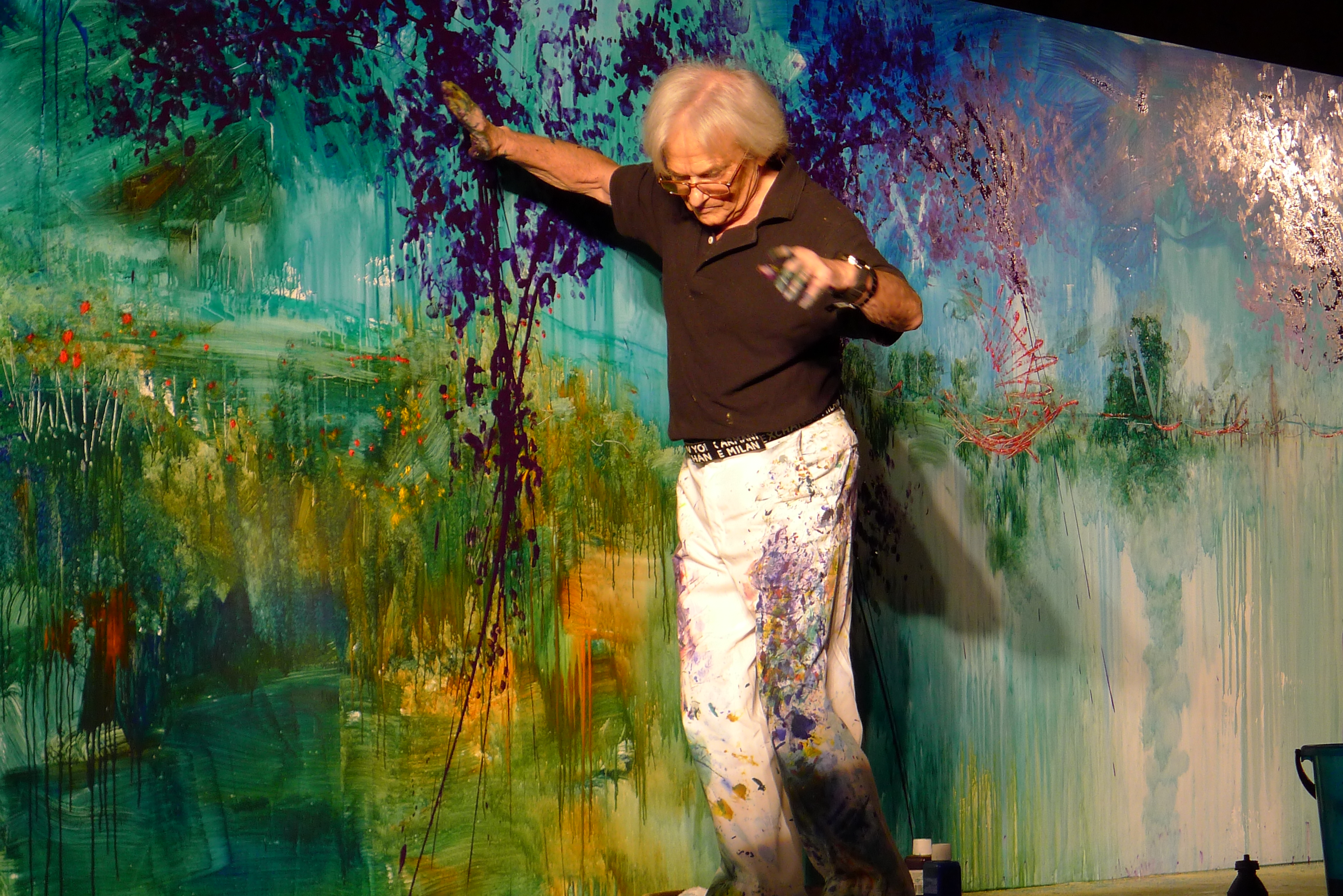 Evento en vivo Organizado para la cumbre de la Asociación Latinoamericana de Metros y Subterráneos (ALAMYS 2011)